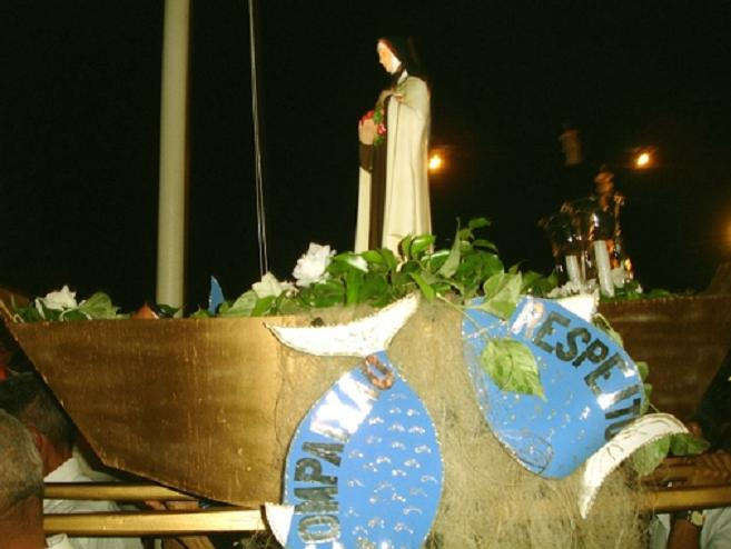 Foto da procissão de Santa Teresinha na cidade de Janduis Rn